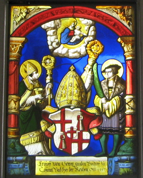 Kreuzgang des Klosters Muri. Fenster S3, Detail: Wappen Christoph Metzler (1557)